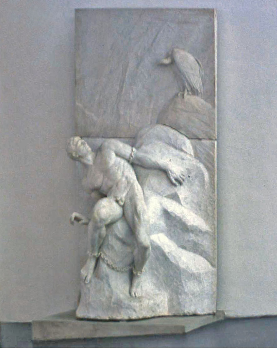 Prometheus (ca. 1900), Reinhold Begas (Berlin)